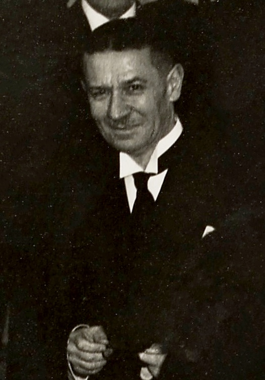 Henri Coutard